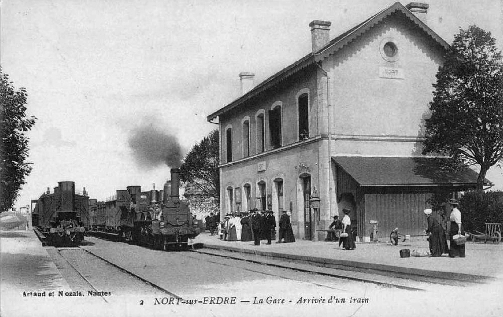 Carte postale ancienne présentant une photo de la gare avec son bâtiment voyageurs, ses deux voies et quais. Deux trains à vapeurs sont présents en gare.